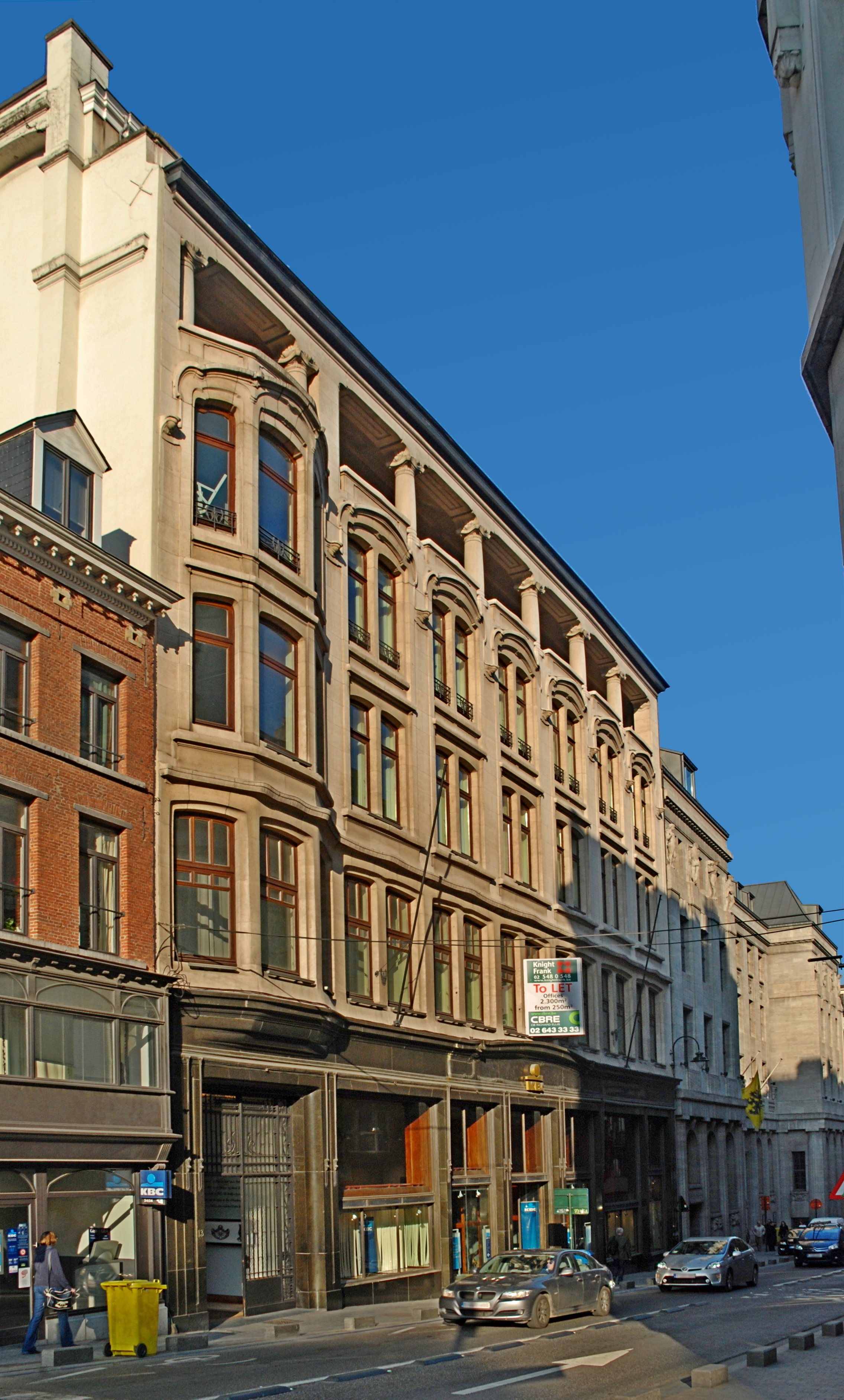 Belgique - Bruxelles - Anciens magasins Wolfers frères (Art nouveau, architecte Victor Horta, 1909)